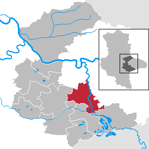 Raguhn-Jeßnitz in Sachsen-Anhalt - Landkreis Anhalt-Bitterfeld